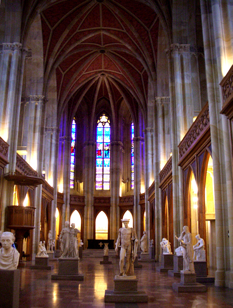 Berlin, Germany: Friedrichswerdersche Kirche